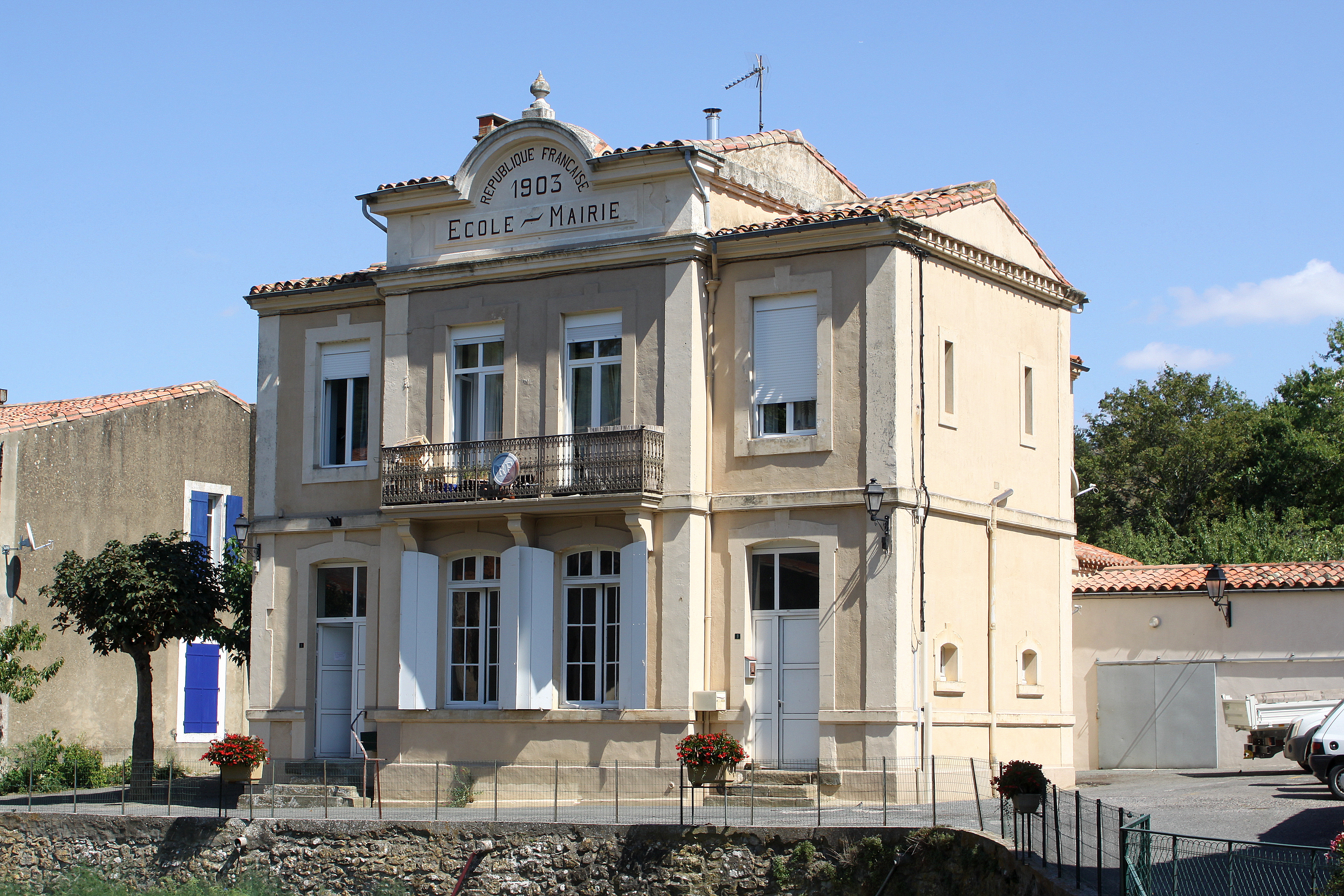 D'Märei vu Labastide-en-Val